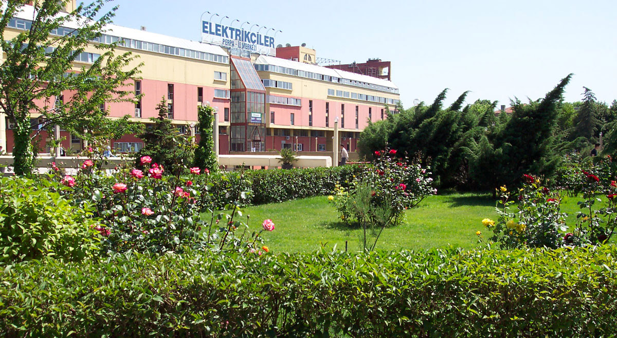 Perpa Ticaret Merkezi bahçesinden Perpa A Blok'un görünümü